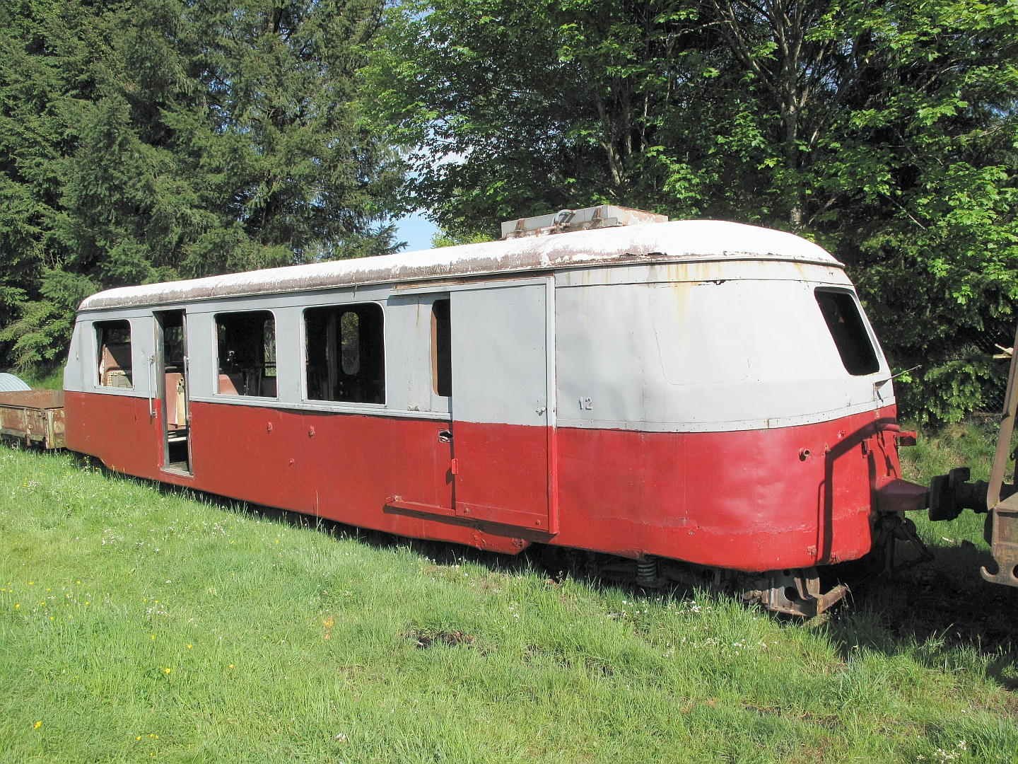 La remorque Billard XR 212 garée en gare de Raucoules-Brossettes (Haute-Loire) le 21 mai 2011.